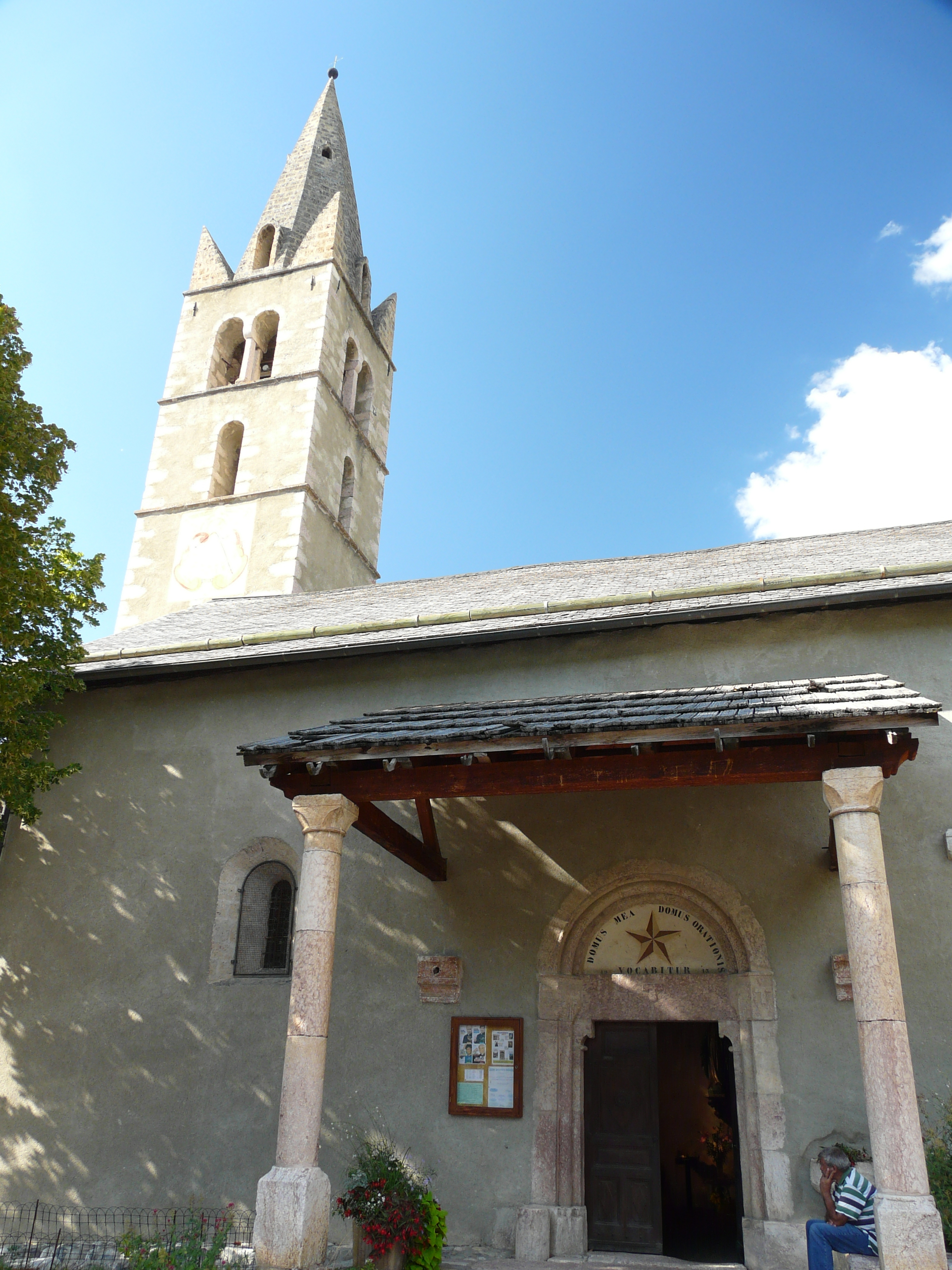 Église Saint-Antoine d'Eygliers (Inscrit) .